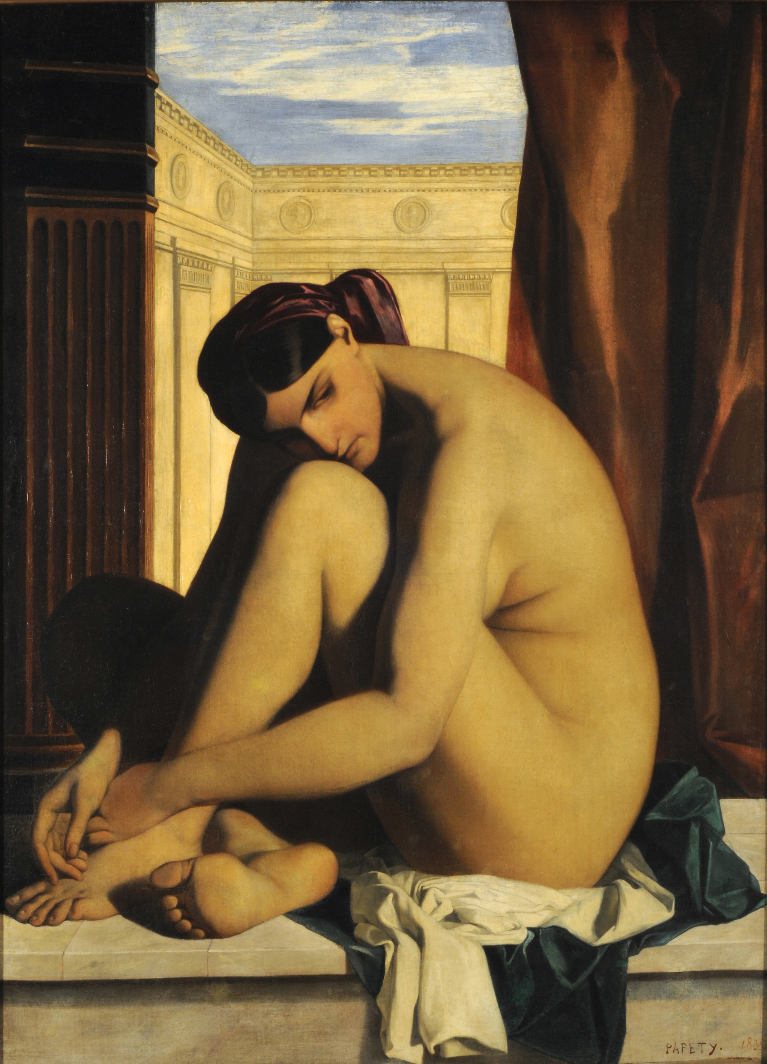 En el baño.